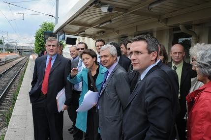 Stéphane Troussel, à droite de l'image, aux côtés de Claude Bartolone en gare du Bourget (Seine-Saint-Denis) pour examiner les travaux de la Tangentielle Nord.